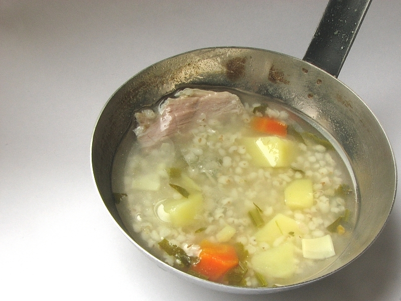 Polish cuisine, soup, krupnik, zupa